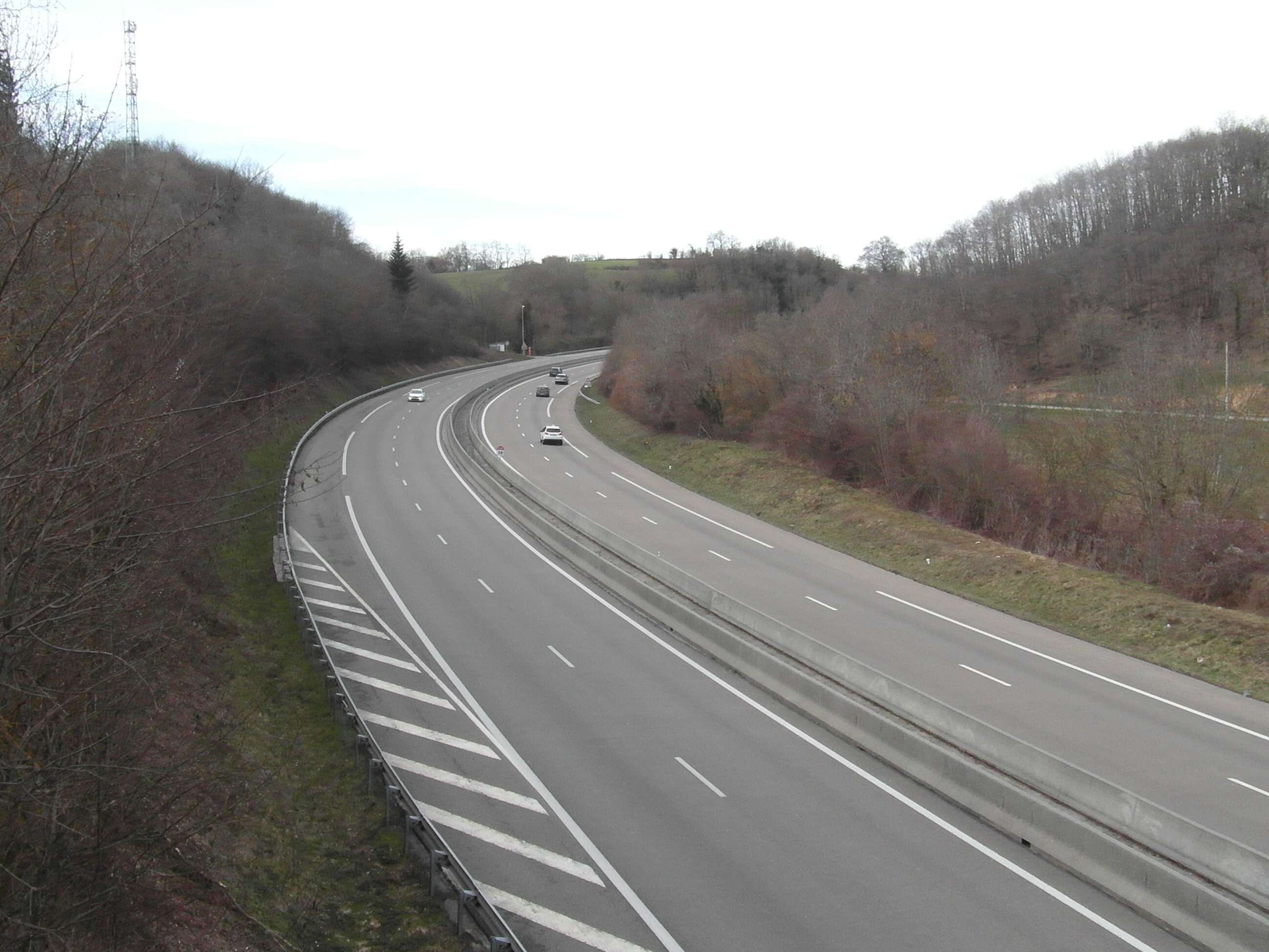 L'A48 près du col de la Rossatière en mars 2019